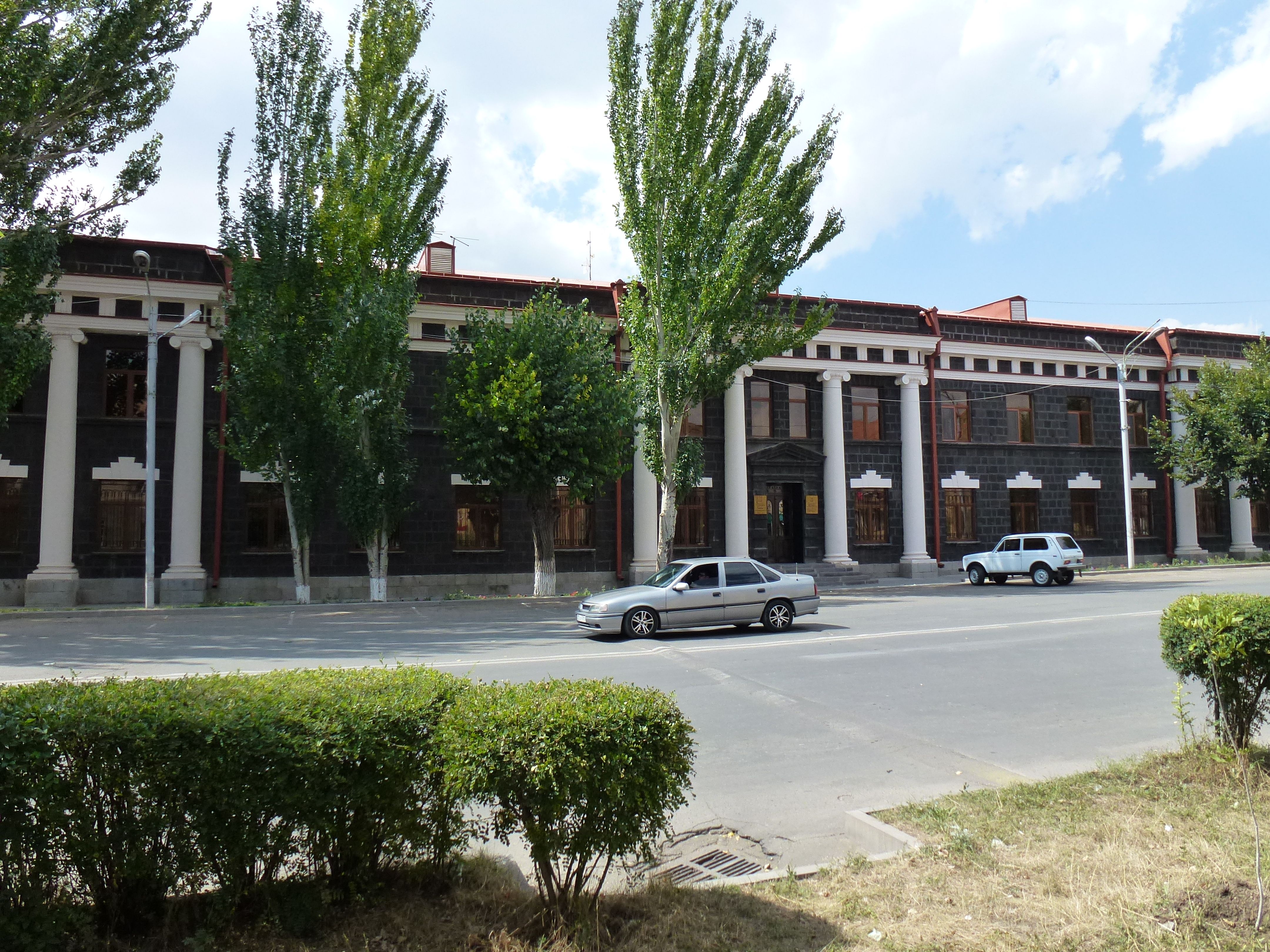 Մարզպետարանի շենքը Գյումրիում 1/4.941